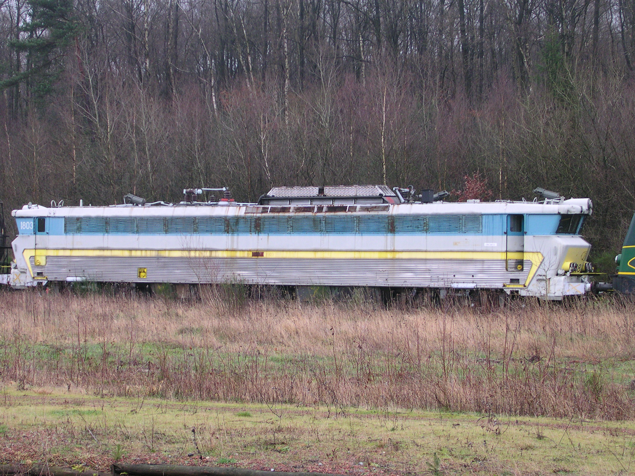 Abgestellte Lokomotive am Bahnhof Raeren